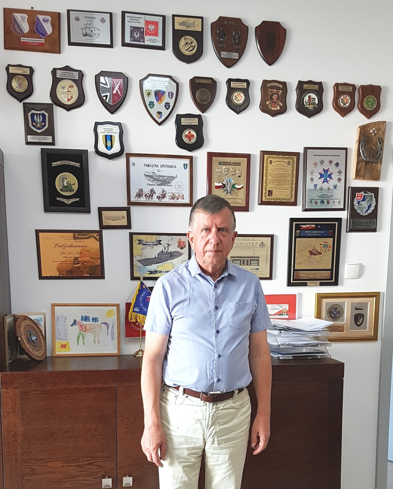 Poseł Michał Jach w biurze poselskim - Stargard